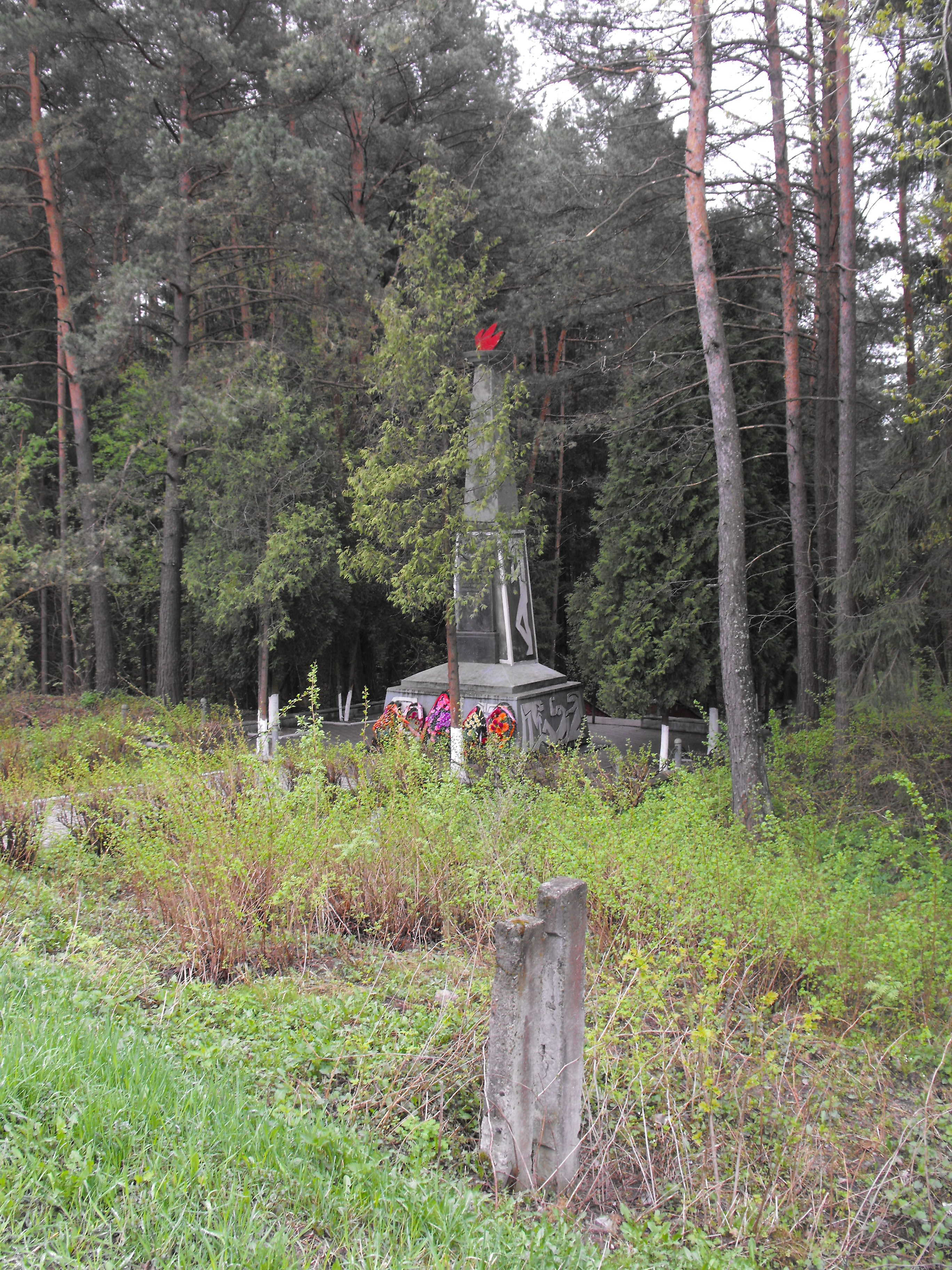 Мемориал на месте убийства нацистами узников Борисовского гетто. Находится в Борисове на обочине улицы Лопатина - примерно напротив через дорогу от инфекционной больницы (улица Лопатина, 172).